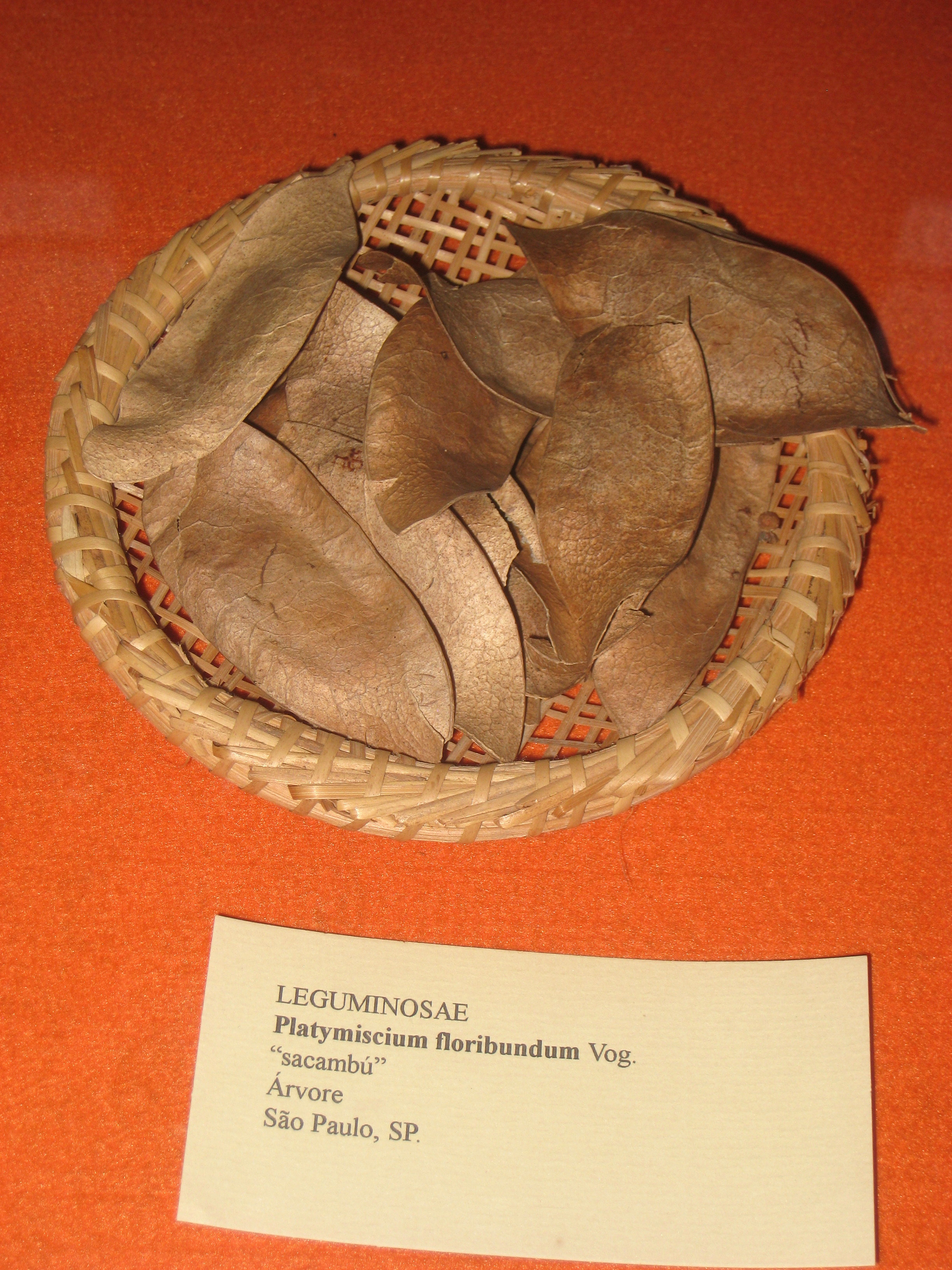 Platymiscium floribundum specimen in the Museu Botânico Dr. João Barbosa Rodrigues, Jardim Botânico de São Paulo, São Paulo City, SP, Brazil.